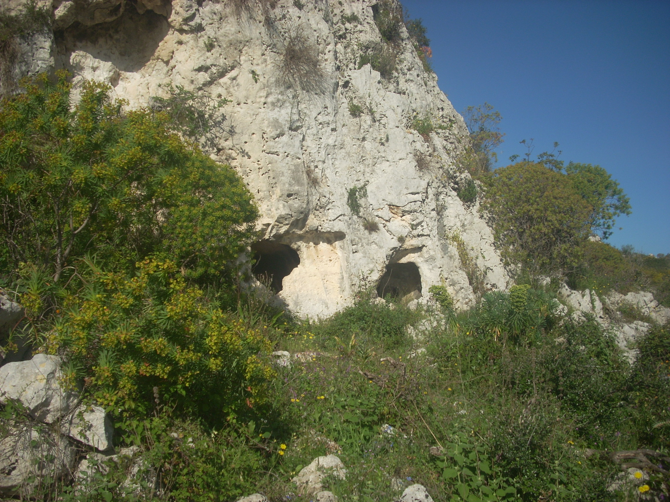 Solarino (SR), Necropoli di Cava del Rivettazzo, tombe